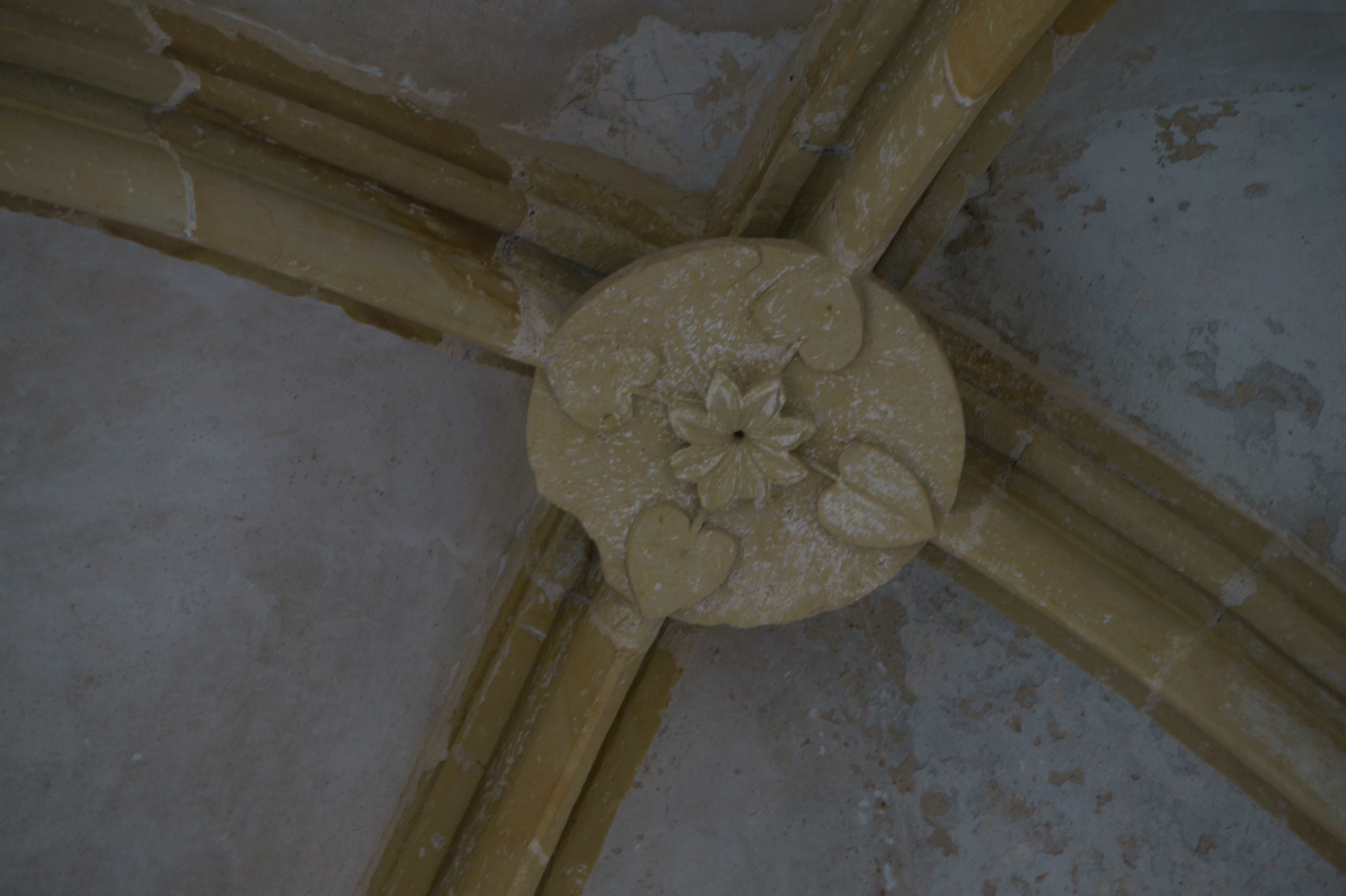 Bezděz - klenák v kapli